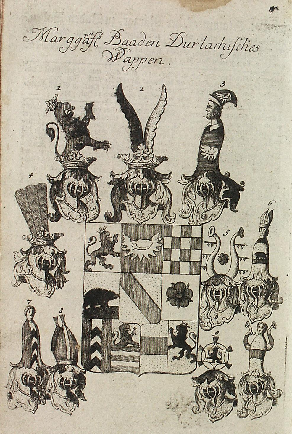 Bádeni címer